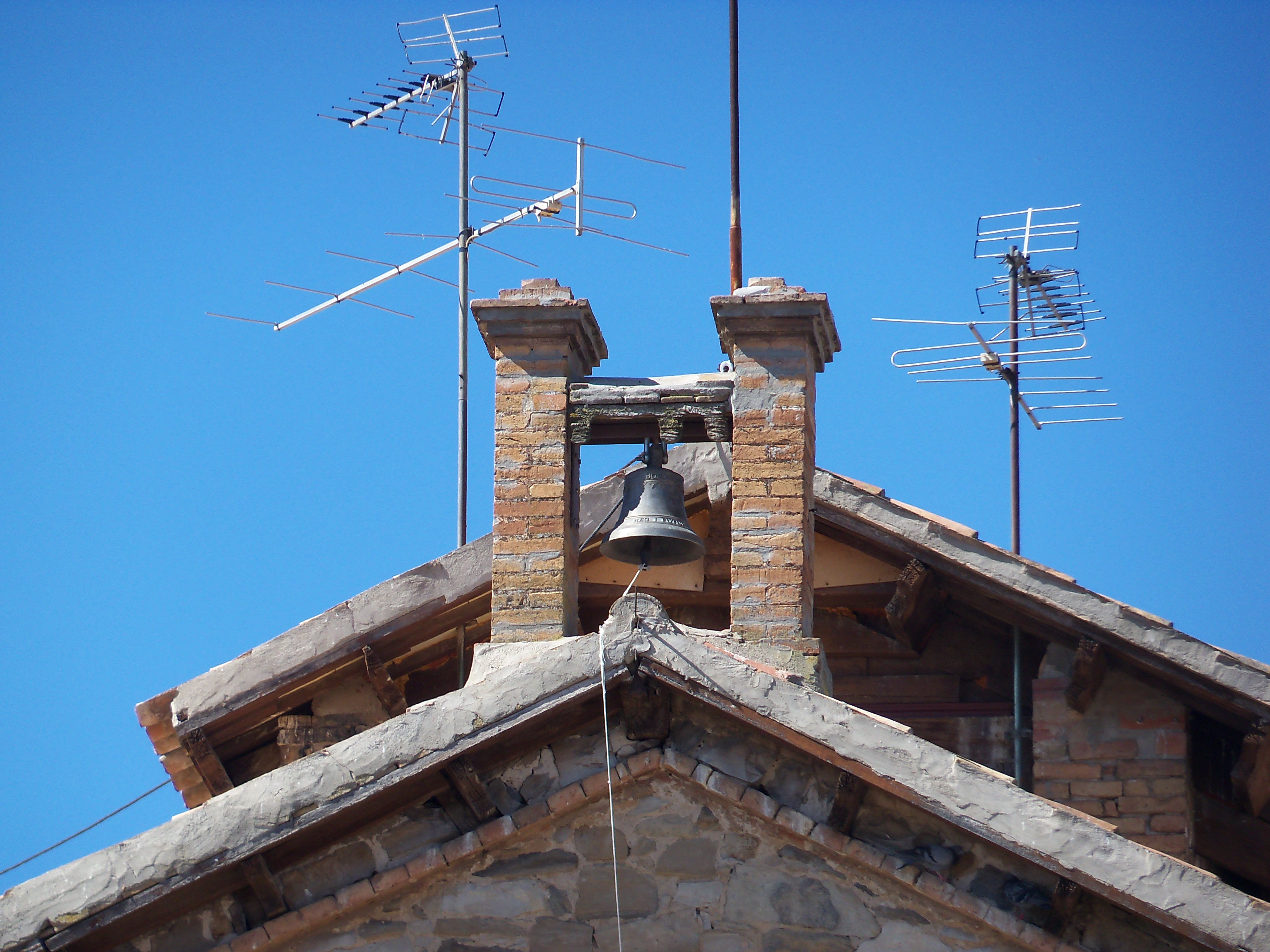 Casa al canal d'Urgell (Mollerussa)